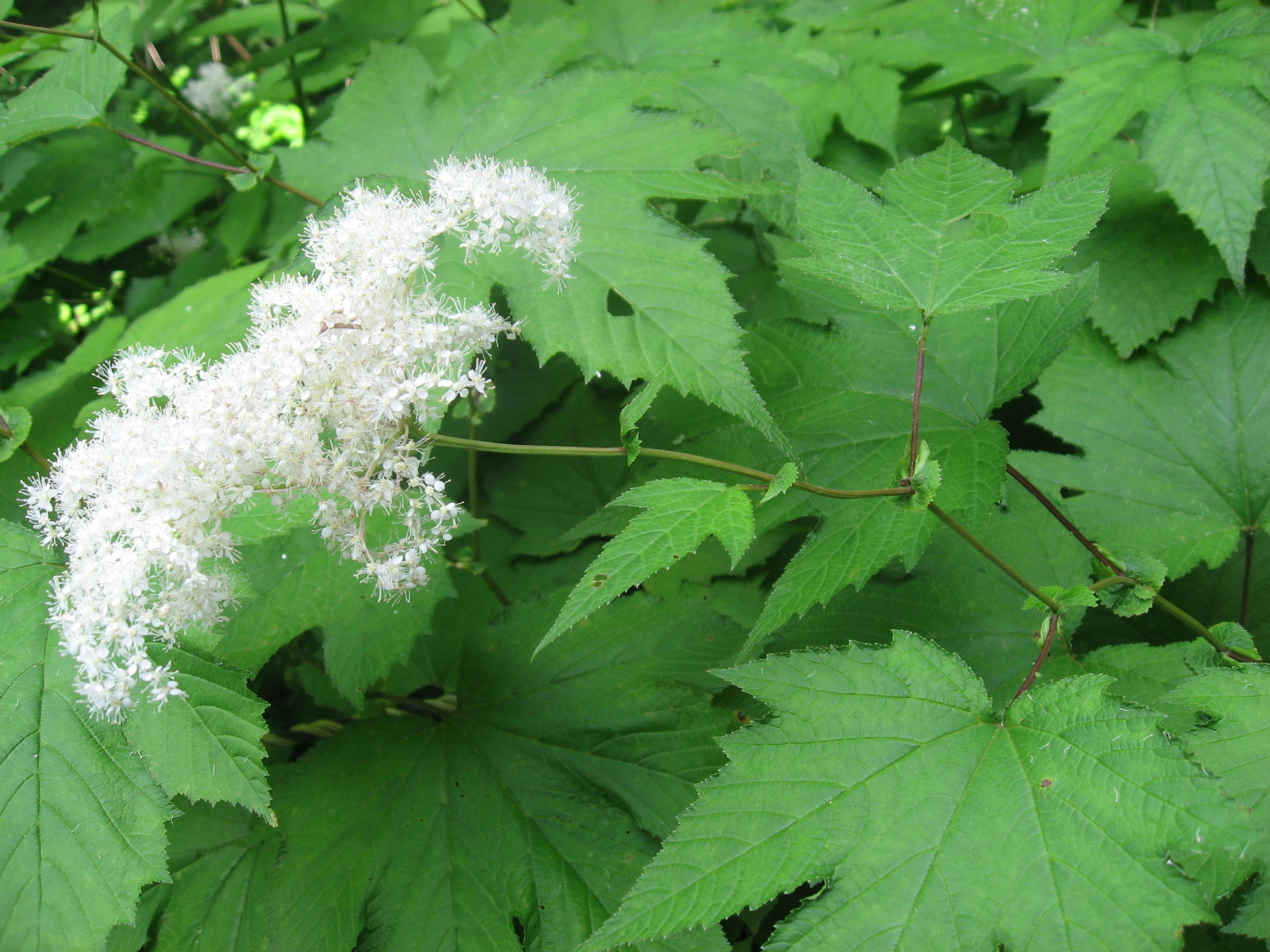 Kamtschatka-Mädesüß (Filipendula kamtschatica)